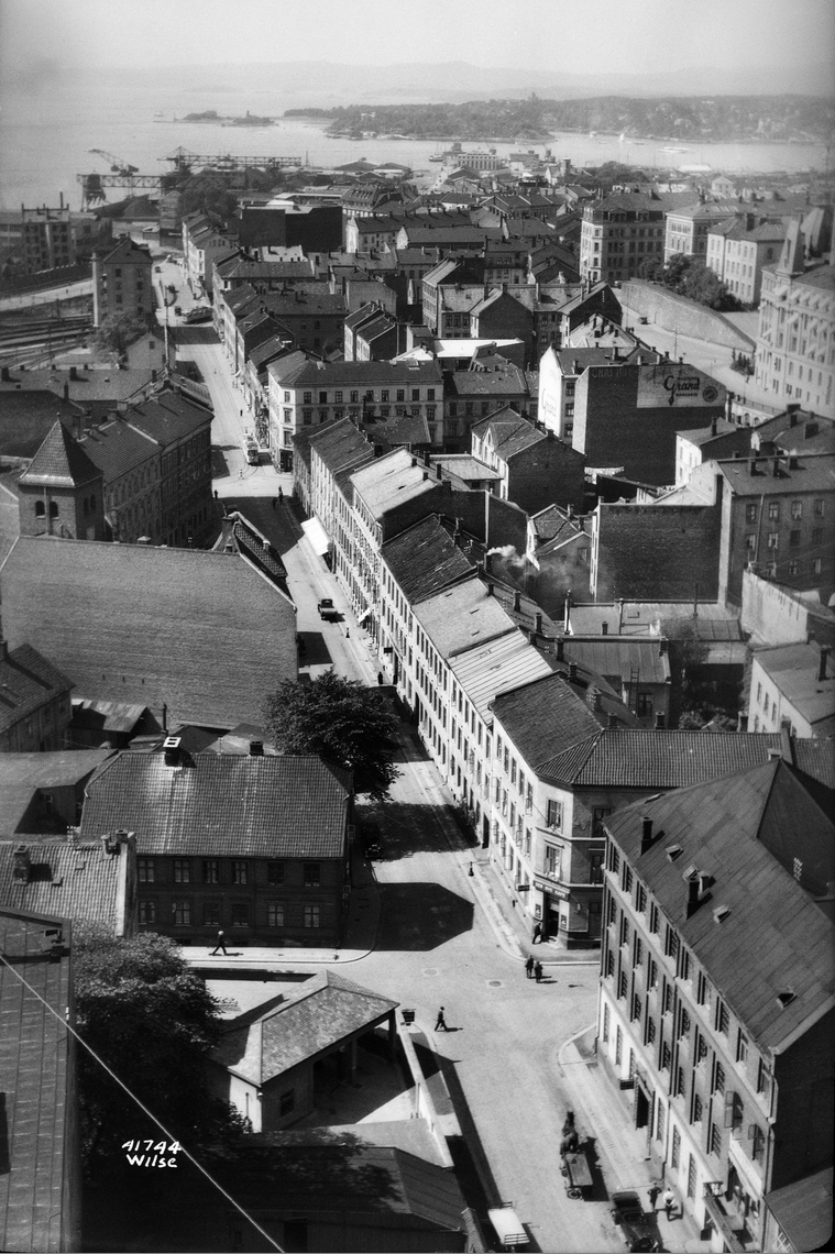 Utsikt fra Odd Fellow-gården over Munkedamsveien. Foto: Anders Beer Wilse (1934). Fra Byhistorisk samling hos Oslo Museum.